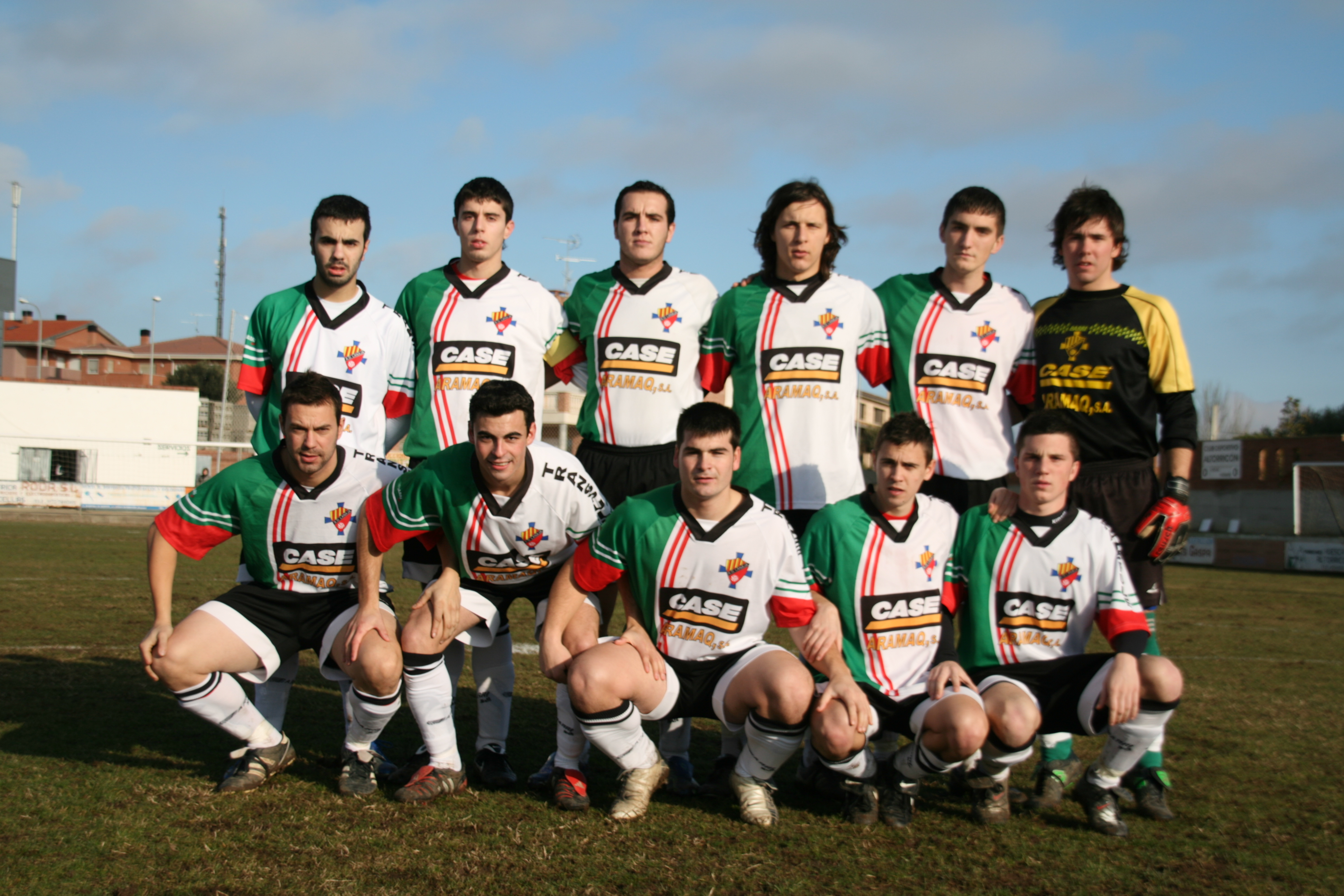 Lanaja (Altorricón 2 - Lanaja 1 (11-01-2009))